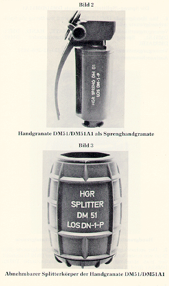 Sprenghandgrante_und Splitterkoerper DM51 der Bundeswehr